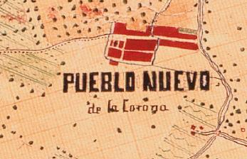 Llocnou de la Corona el 1883 (el nord esta a la dreta).